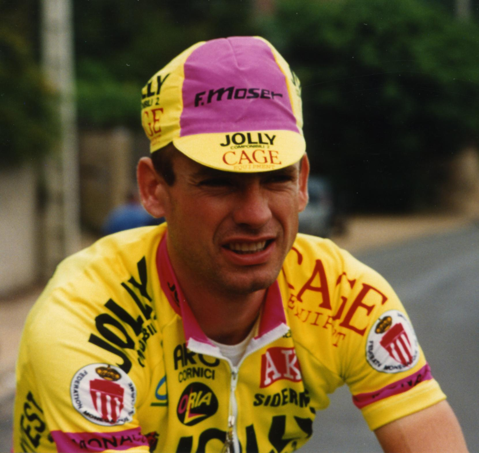 Critèrium de LEVES